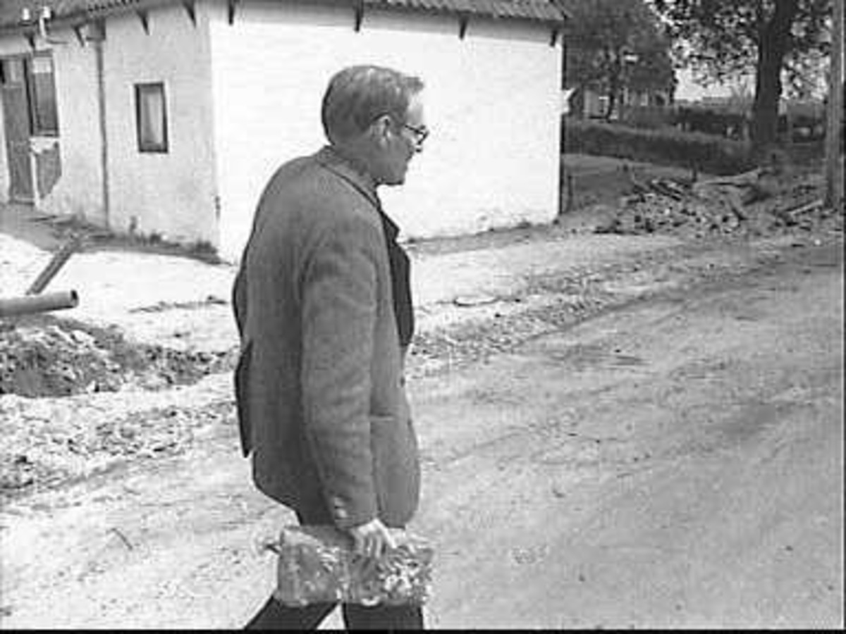 Studiedag Friesland: R, Meischke verplaatst een kloostermop (opmerking: Deze afbeelding hebben wij helaas alleen in deze lage resolutie.)